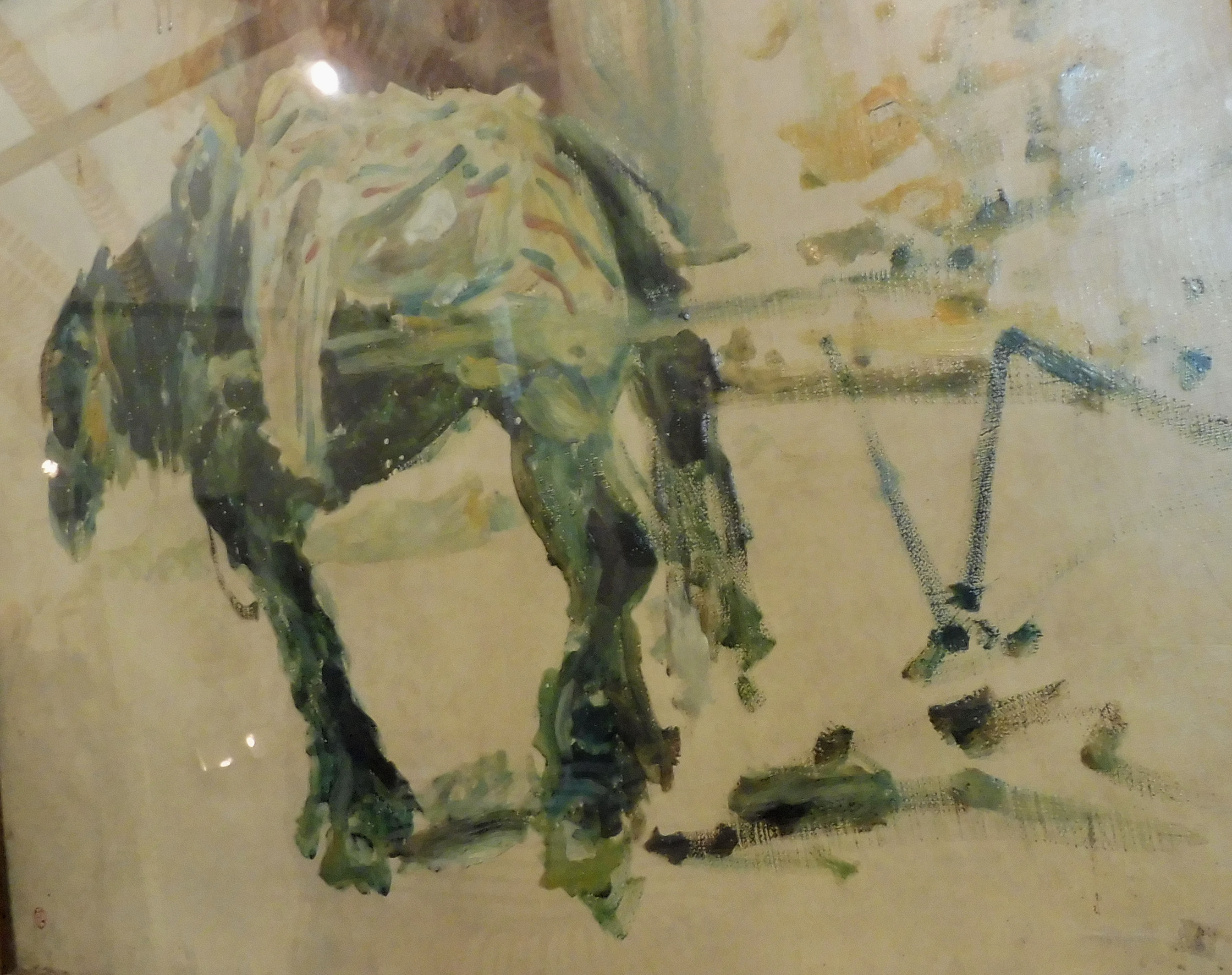 Henri de Toulouse-Lautrec, Cheval de trait à Celeyran, 1881, Huile sur toile, Don de la comtesse de Toulouse-Lautrec, 1922.